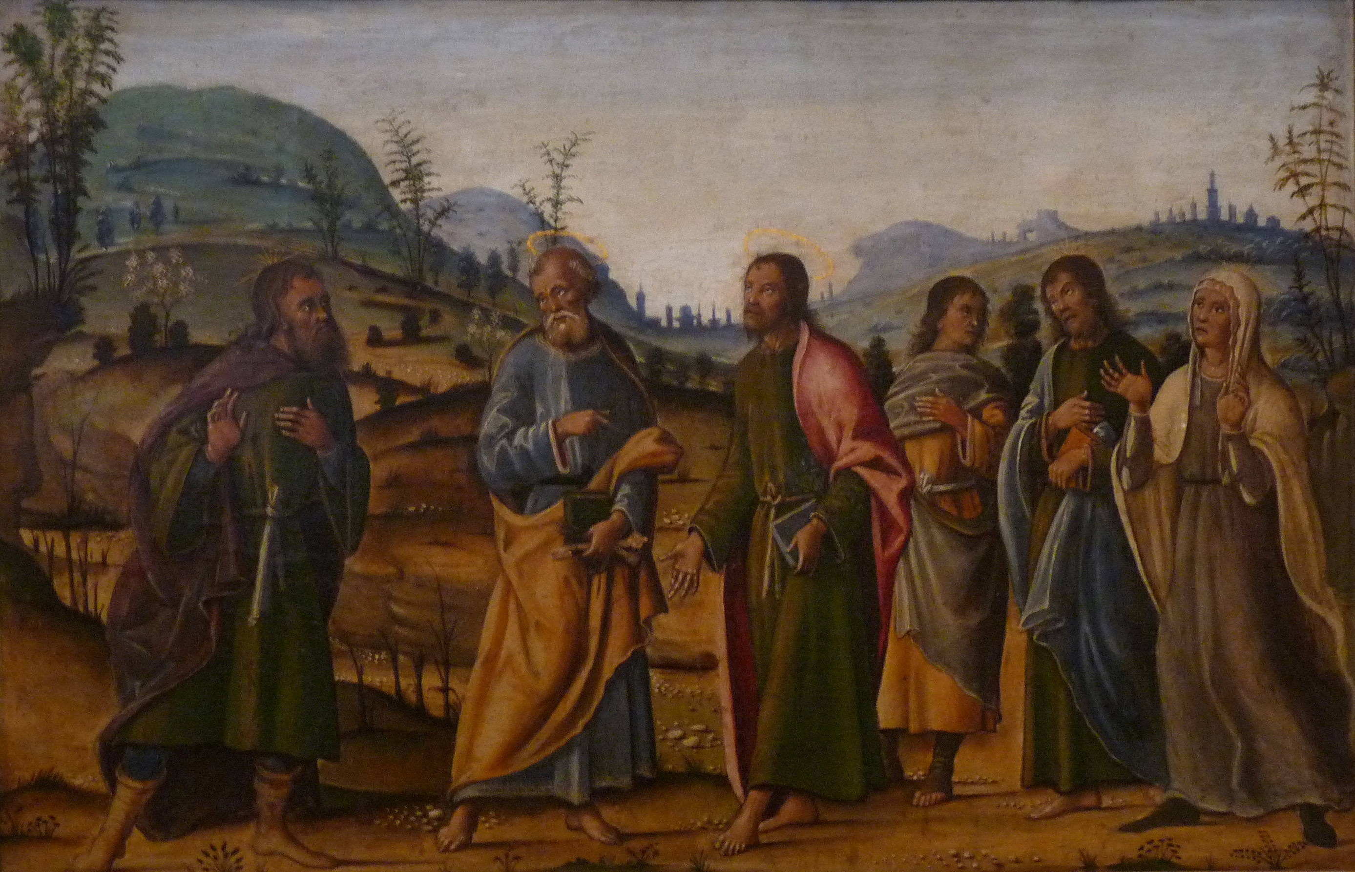 Saint Clément retrouvant sa familletitle QS:P1476,fr:"Saint Clément retrouvant sa famille" label QS:Lfr,"Saint Clément retrouvant sa famille"